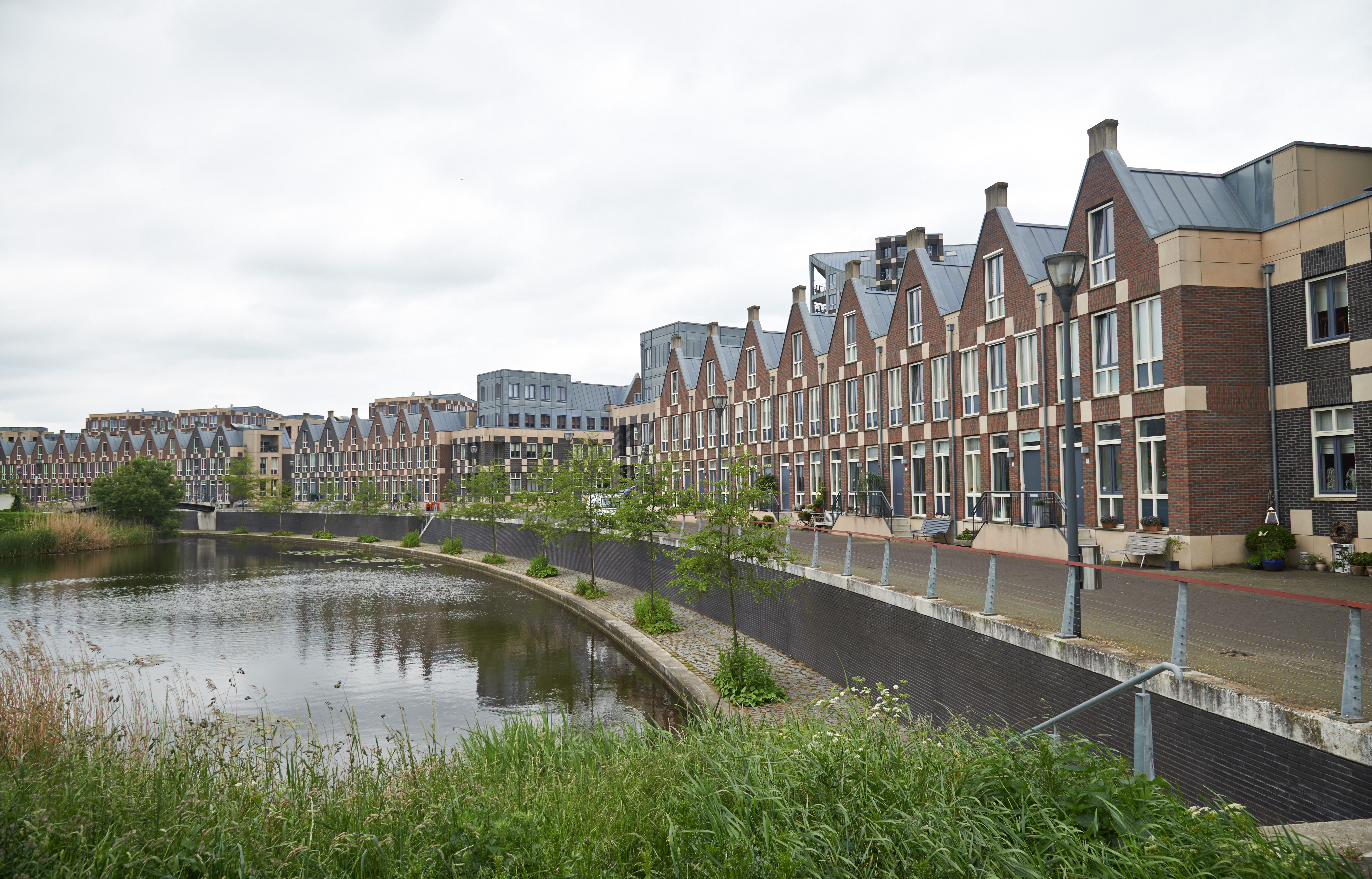 Doesburg, Blekerskade